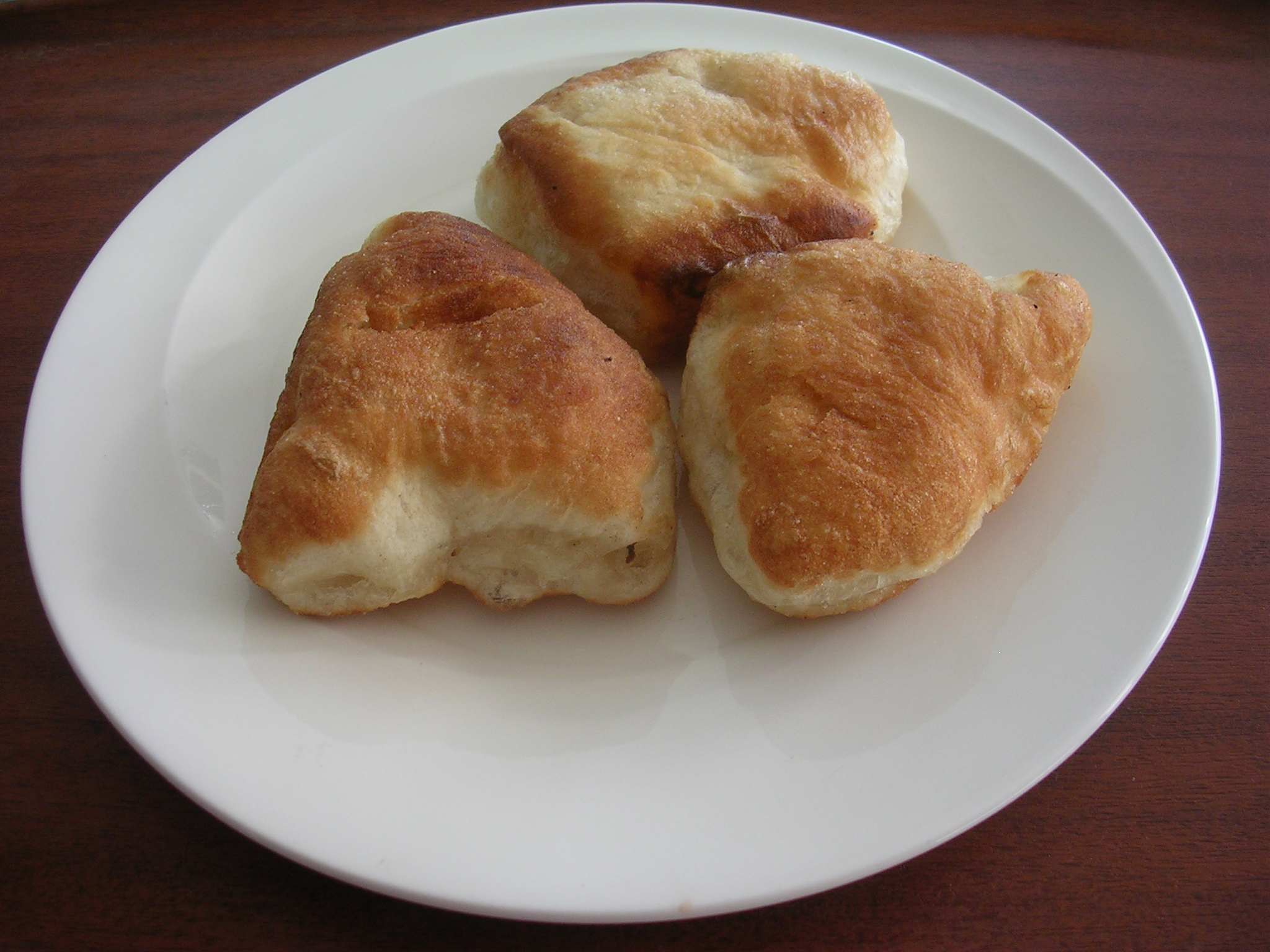 kendi eserim...nikon E3200 ile çekilmiştir.